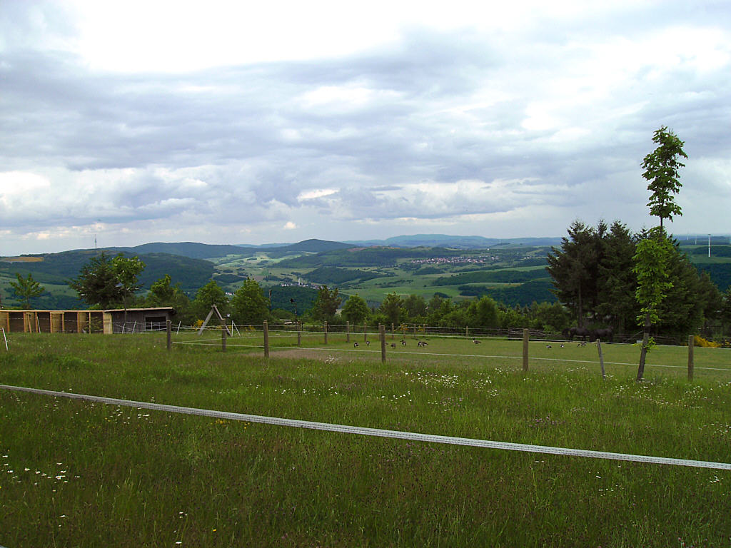 Potzberg mit Wildpark: Blick auf die Pfälzer Landschaft Licensing thumb|left|Original